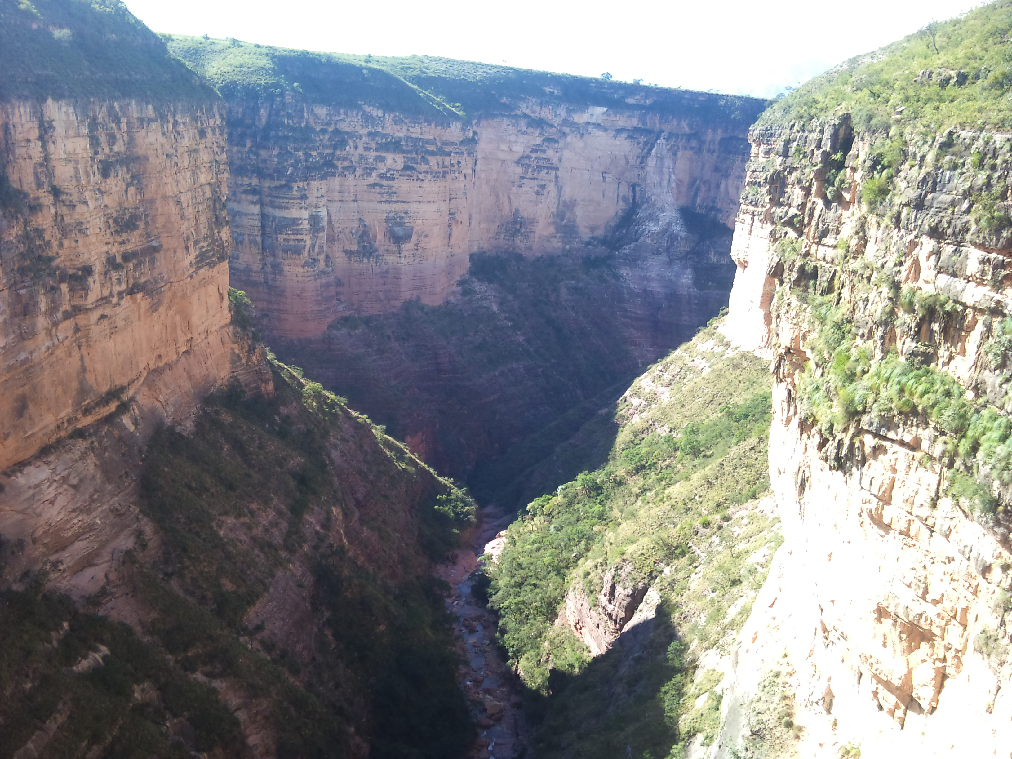 fotos de Bolivia